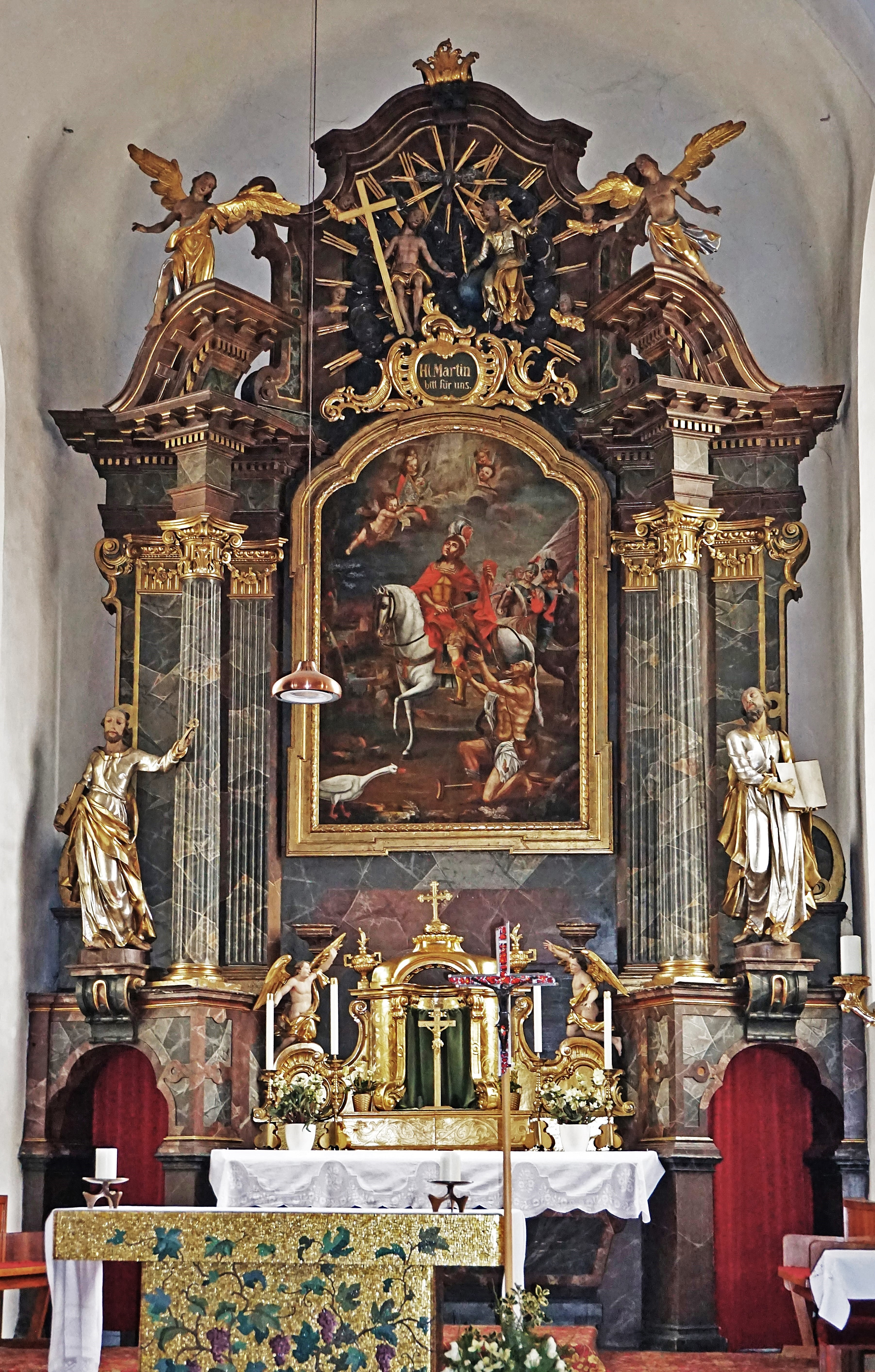 Kath. Pfarrkirche St. Martin (Villach), der barocke Hochaltar